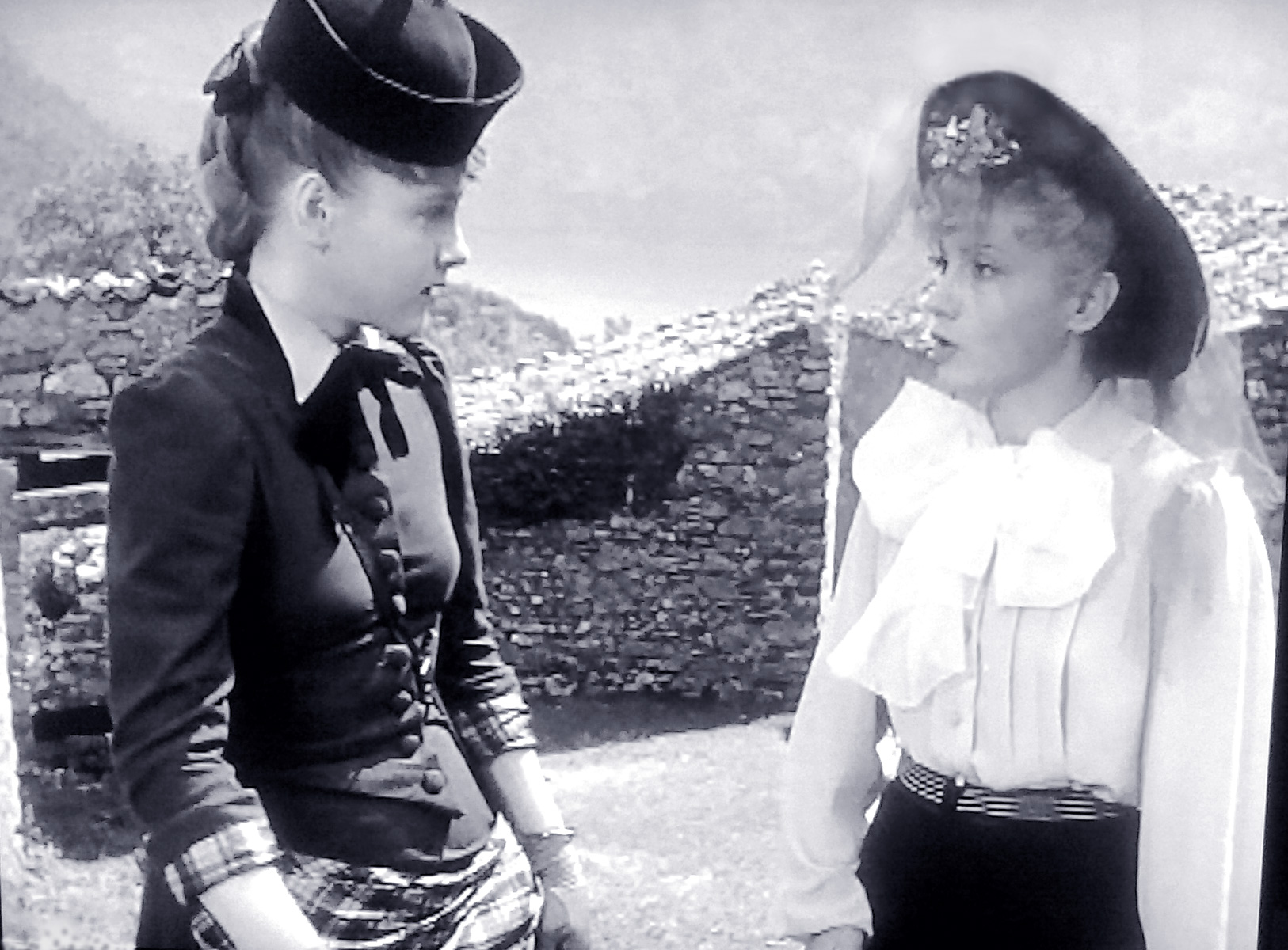 Irasema Dilian ed Isa Miranda, in un esterno di Malombra (Soldati, 1942).